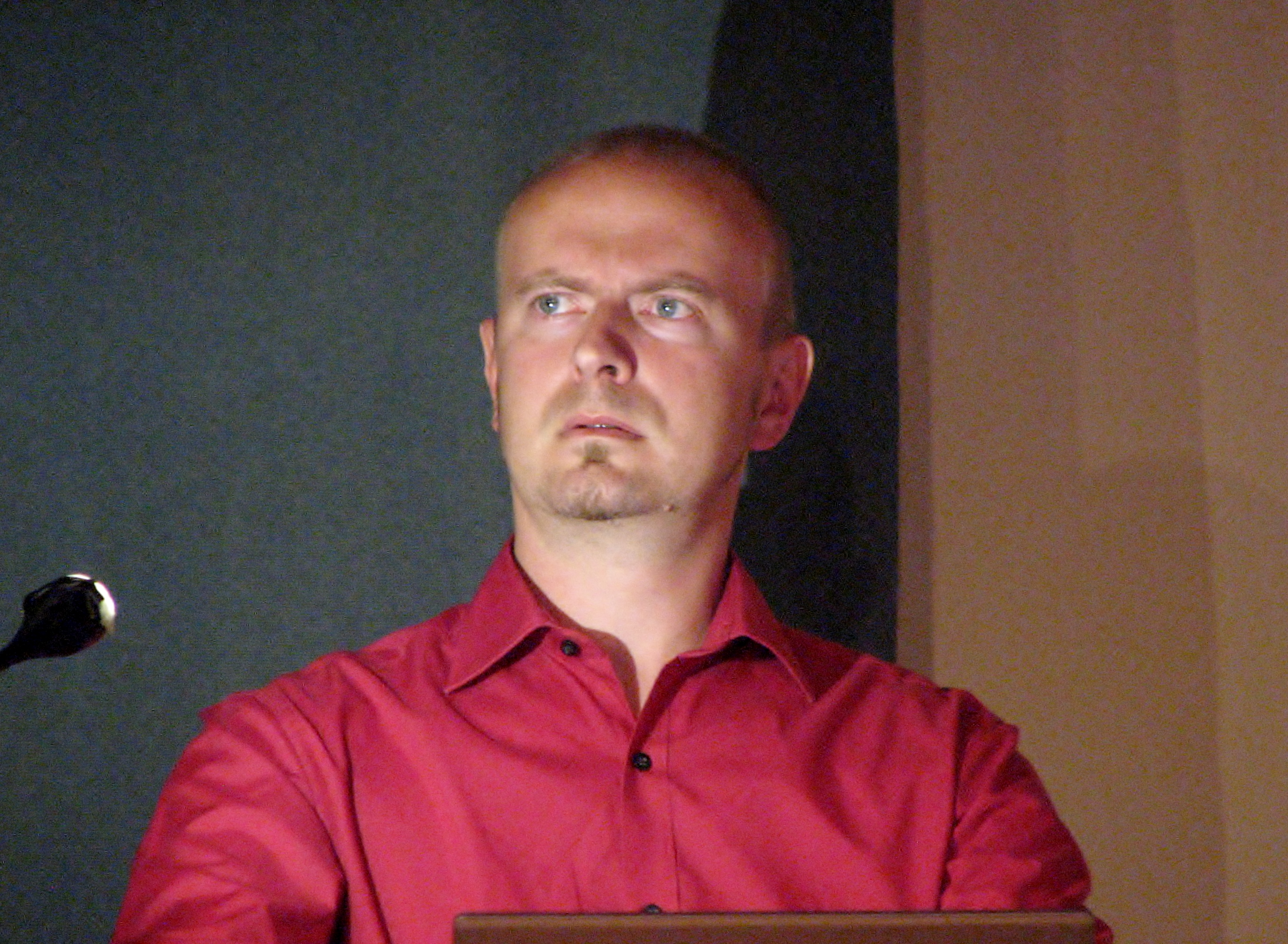 Tõnis Leemets esinemas Tallinna Kirjanike Majas festivali III Dovlatovi Päevad Tallinnas raames 24. augustil 2013